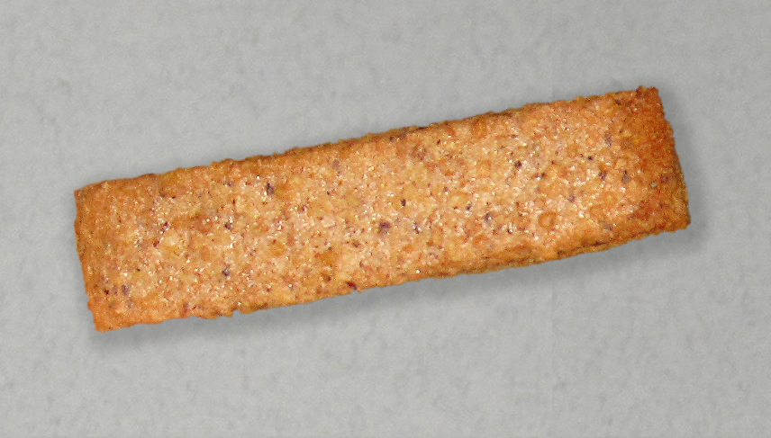 Bergischer Zwieback der Bergischen Kaffetafel in Radevormwald, Kottmannshausen 1.